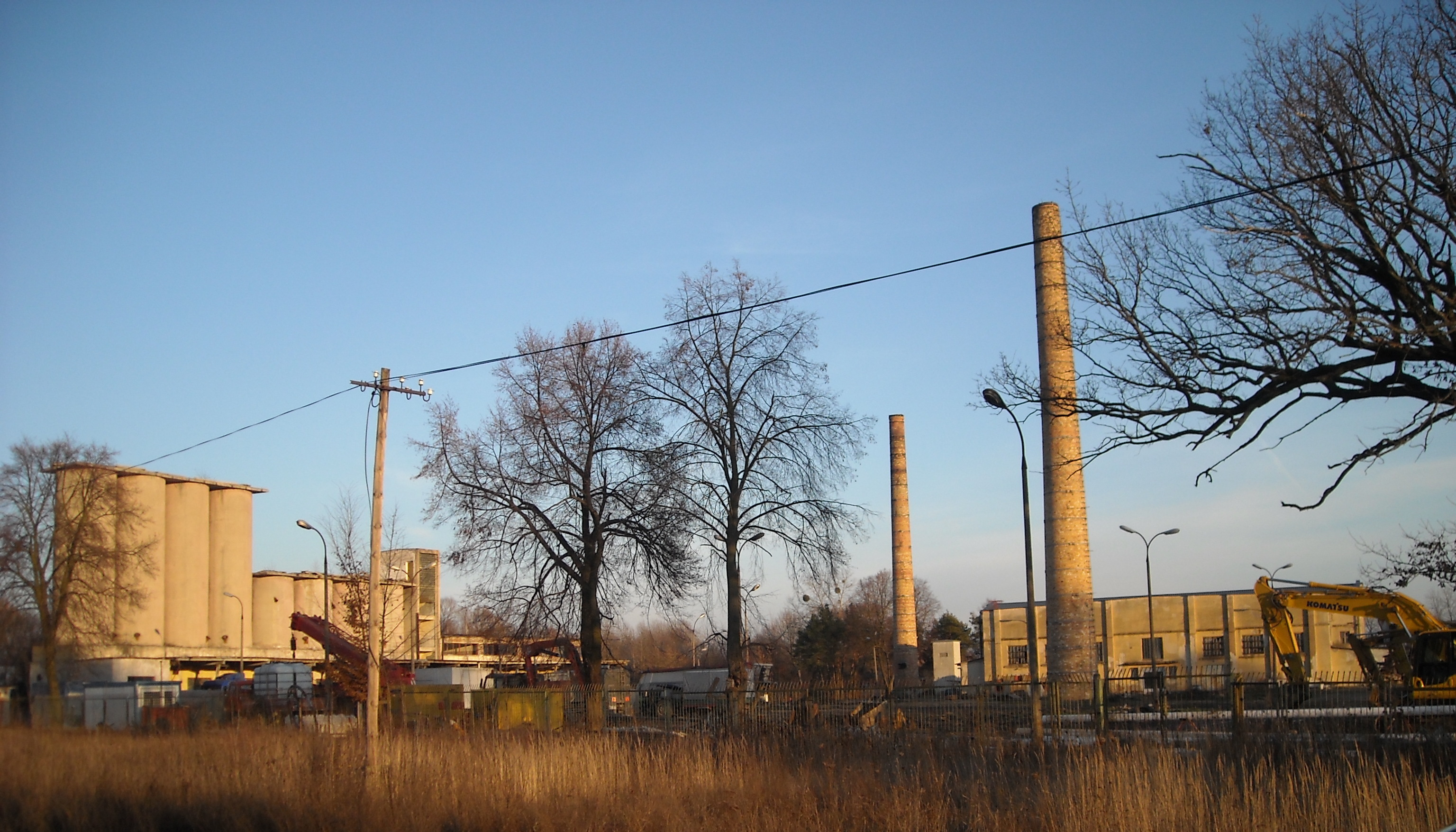 Pozostałości huty szkła Ruda Opalin w Rudzie Opalin, pow. chełmski